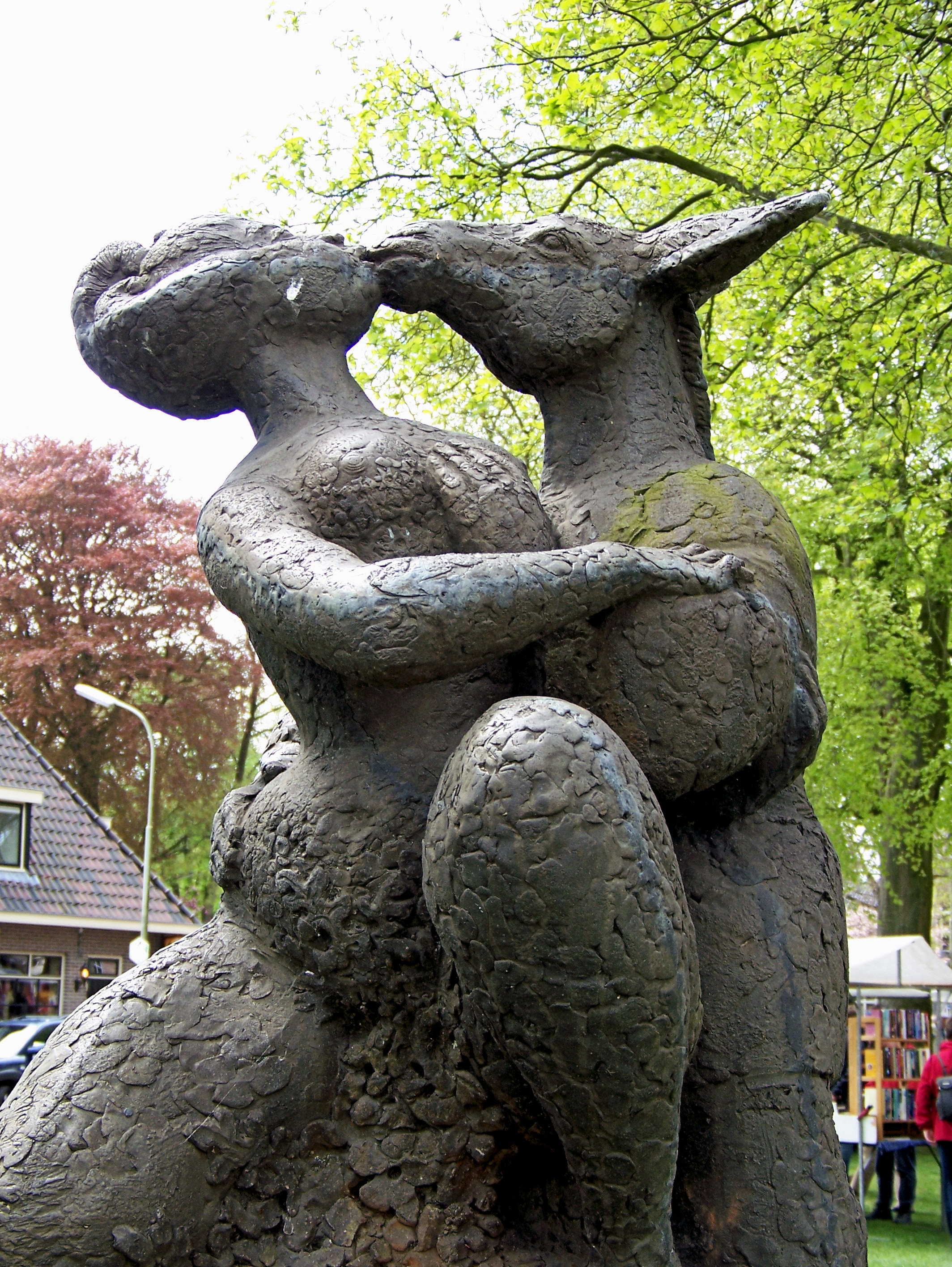 Zicht op het beeldhouwwerk Titania en Spoel de Wever (1971) van Arie Teeuwisse voor de Sint-Pancratiuskerk nabij de brink in Diever Scene from A Midsummer Nights' Dream by Arie Teeuwisse, Diever, 1971